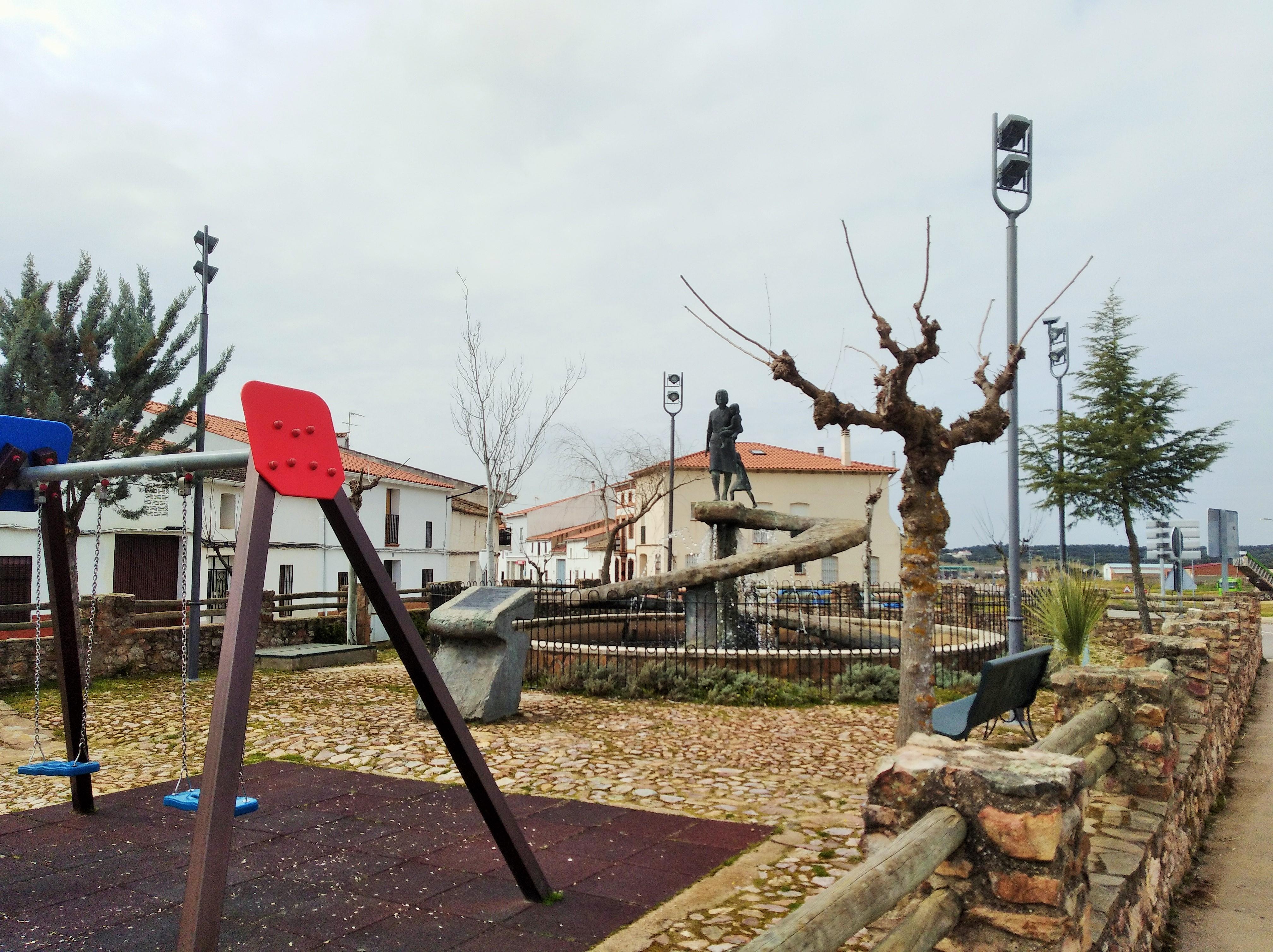 Monumento y fuente en parque público llamado "Fuente de la mujer trabajadora"